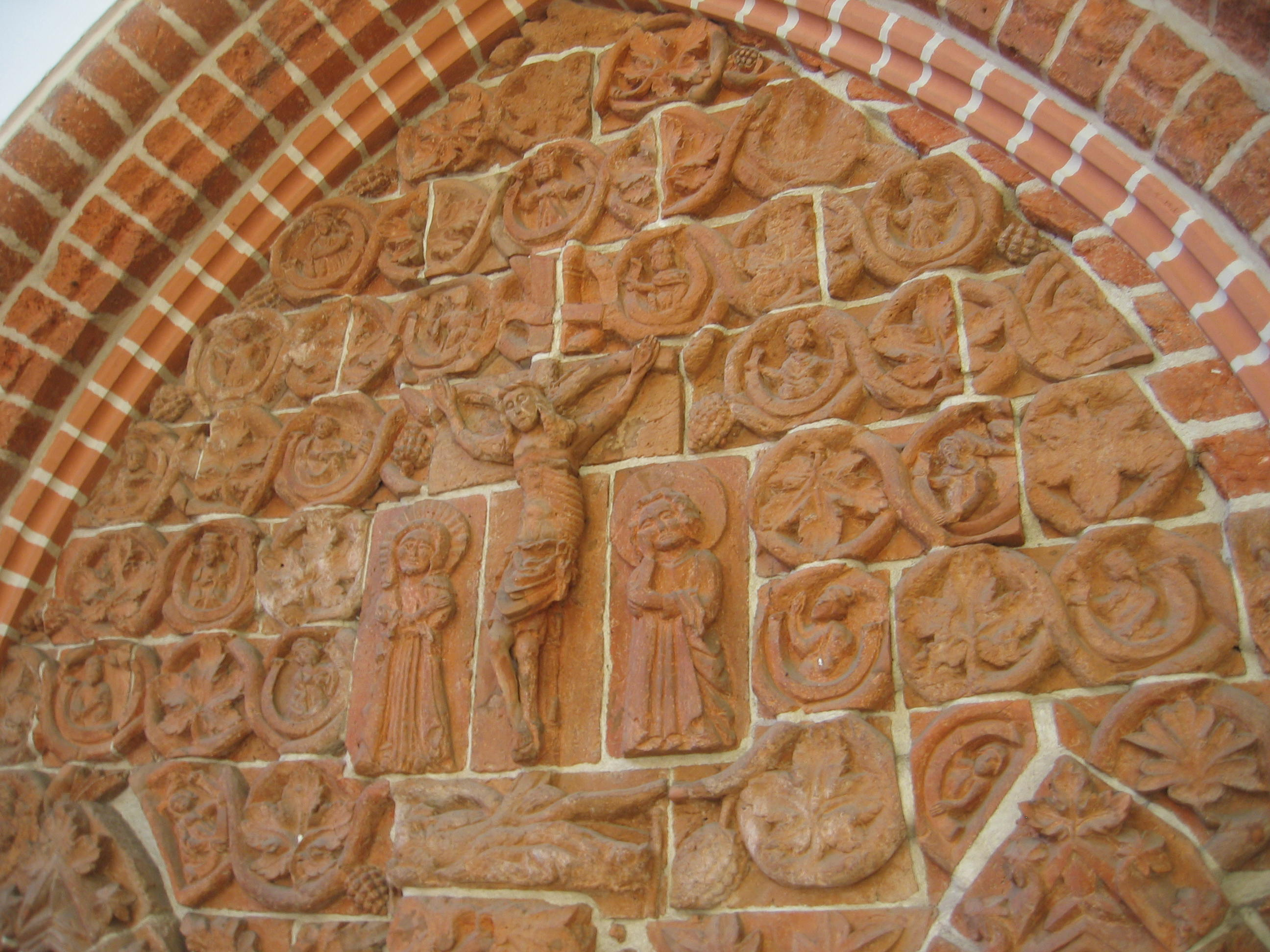 Choszczno - kościół Narodzenia NMP